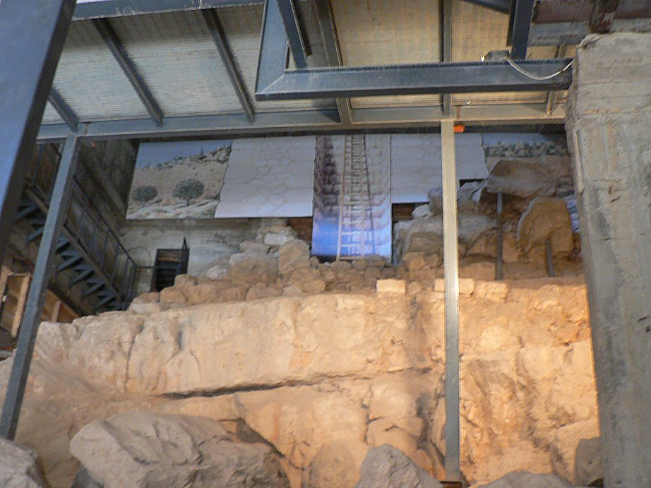 עיר דוד - פיר וורן: אזור המגדלים ובריכת האגירה מתקופת הברונזה